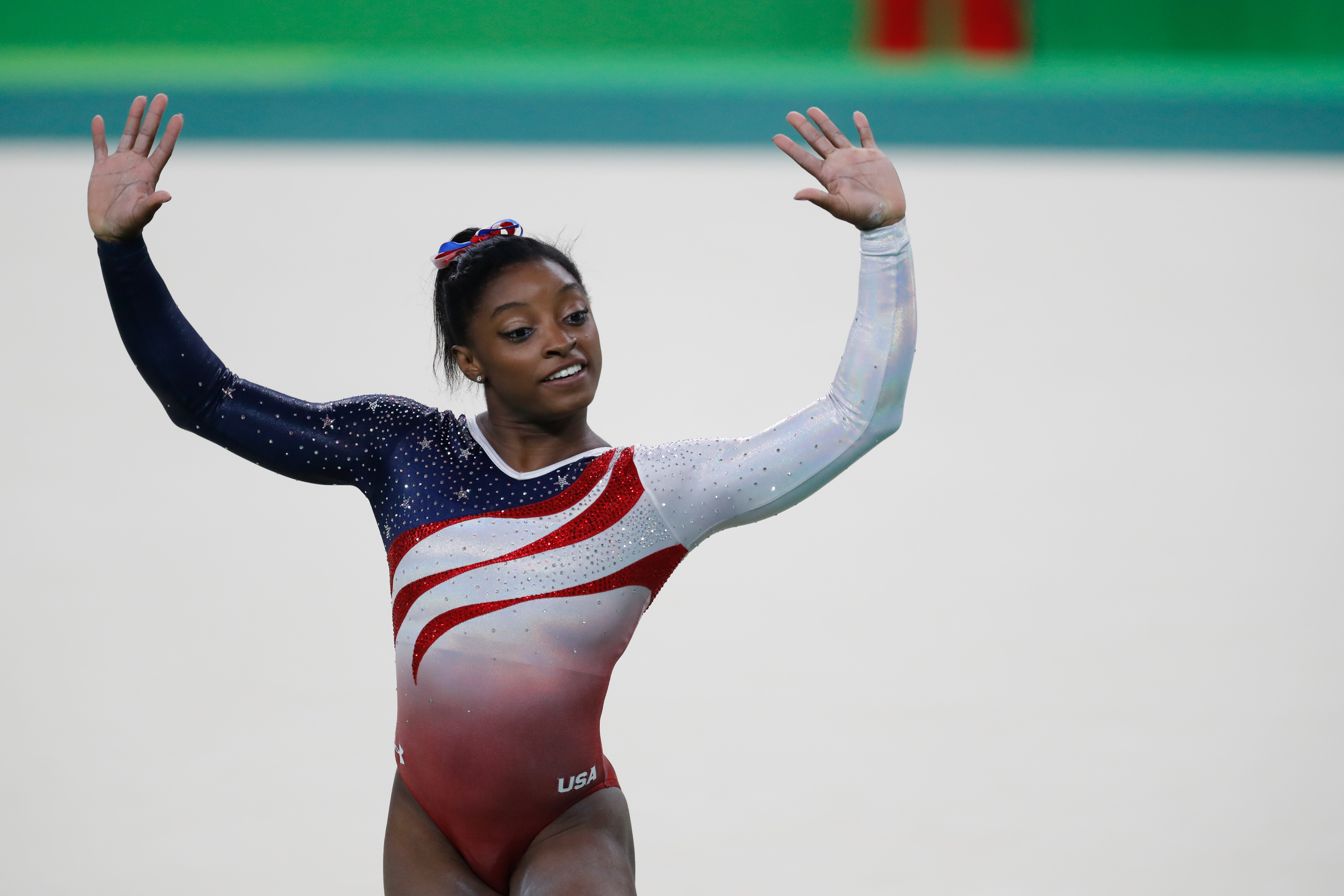 Rio de Janeiro - Simone Biles, ginasta dos Estados Unidos, durante final em que levou medalha de ouro na disputa por equipes feminina nos Jogos Olímpicos Rio 2016. (Fernando Frazão/Agência Brasil)